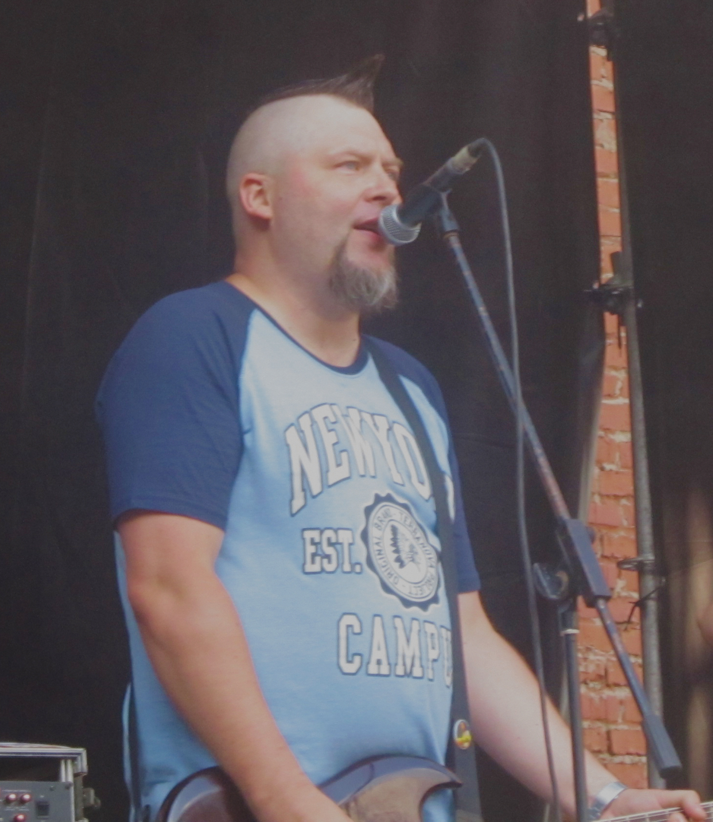 Вокаліст гурту Брем Стокер на фестивалі Захід 2013